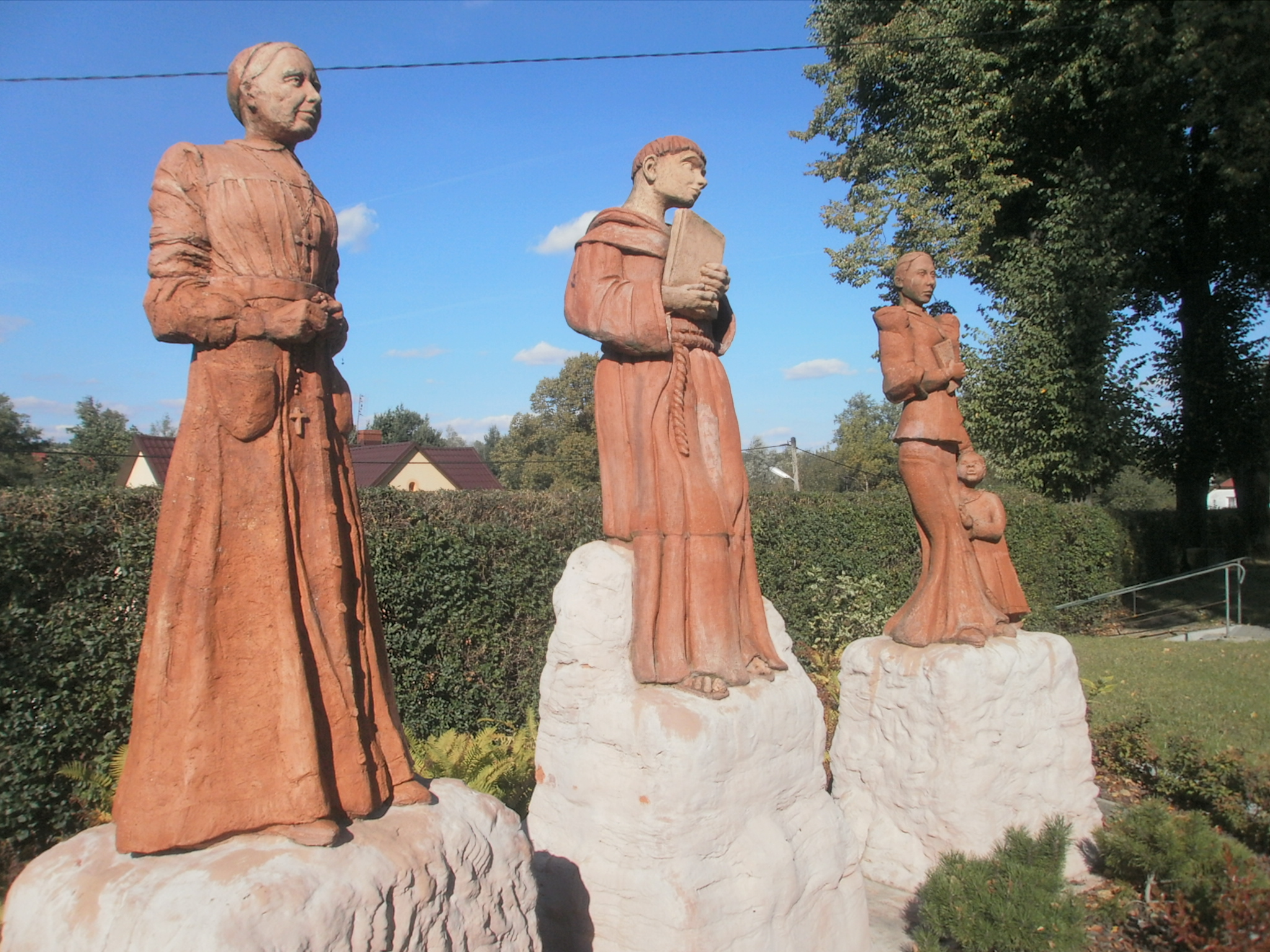 Lipnica Murowana - rzymskokatolicki kościół parafialny pw. św. Andrzeja Apostoła